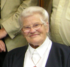 Planetoïdenontdekster dr. Ingrid van Houten-Groeneveld (1674 Groeneveld).